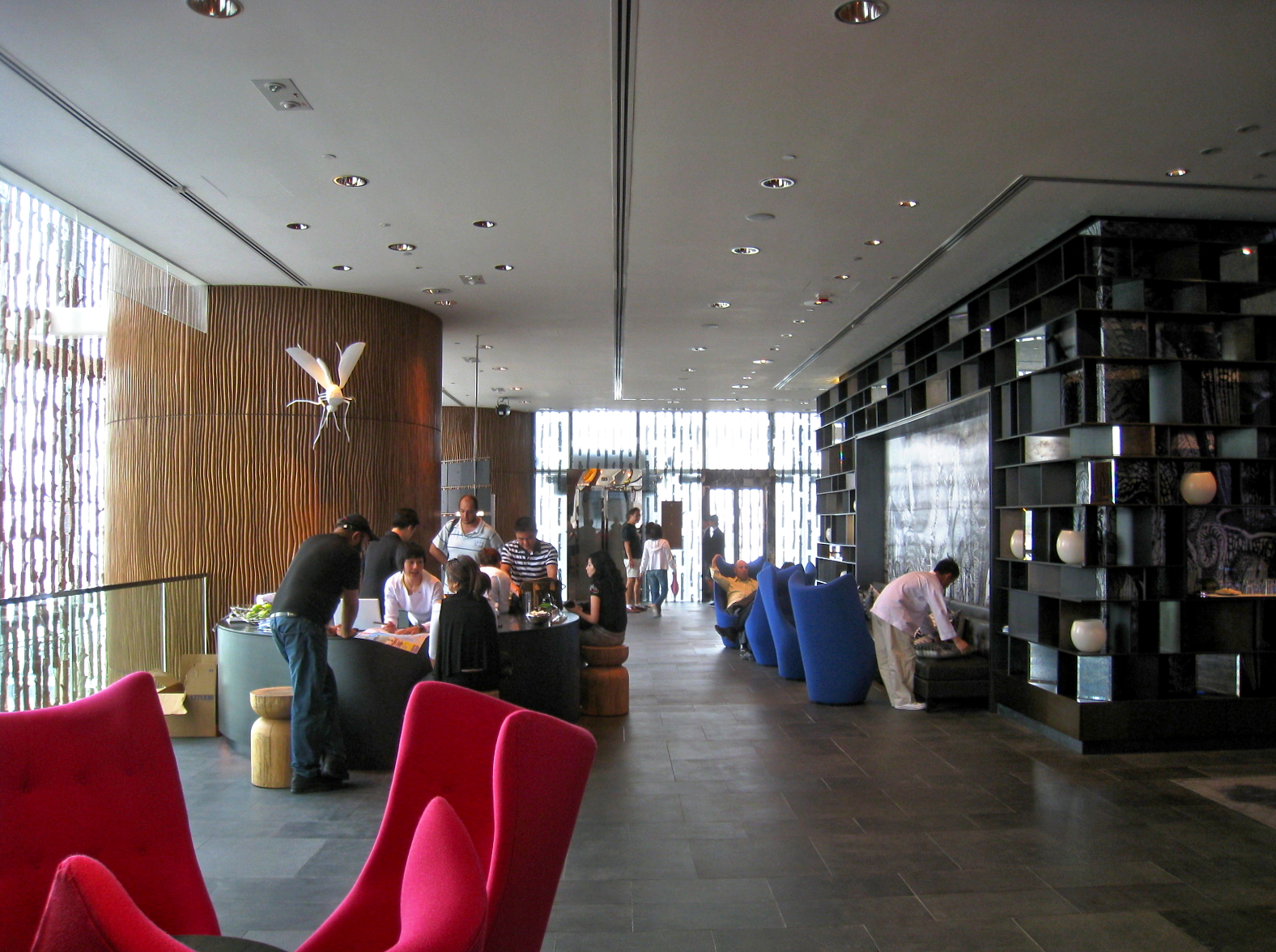 W Hotel Hong Kong 香港W酒店